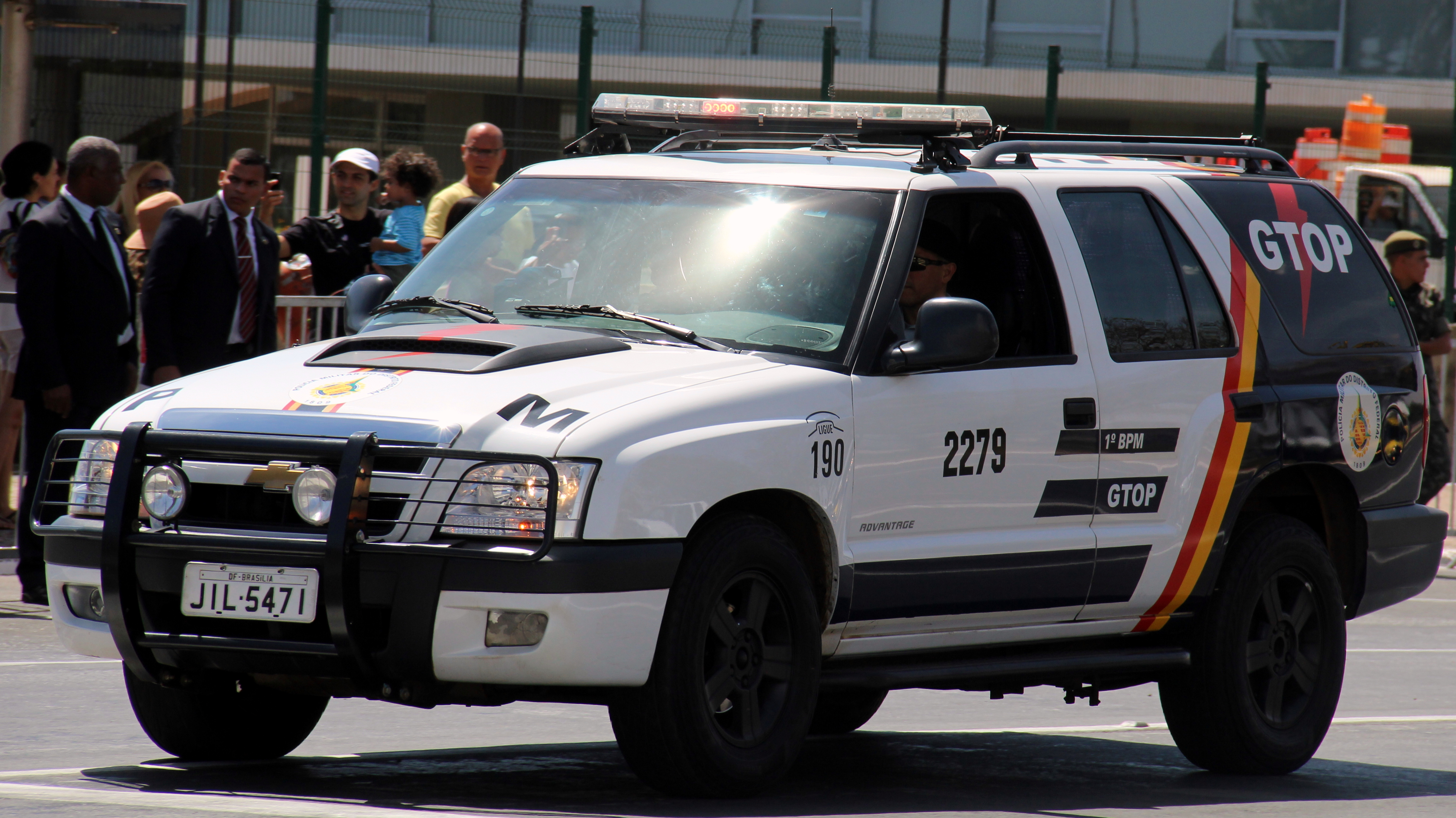 Grupo Tático Operacional 21 1° Batalhão de Polícia Militar Polícia Militar do Distrito Federal